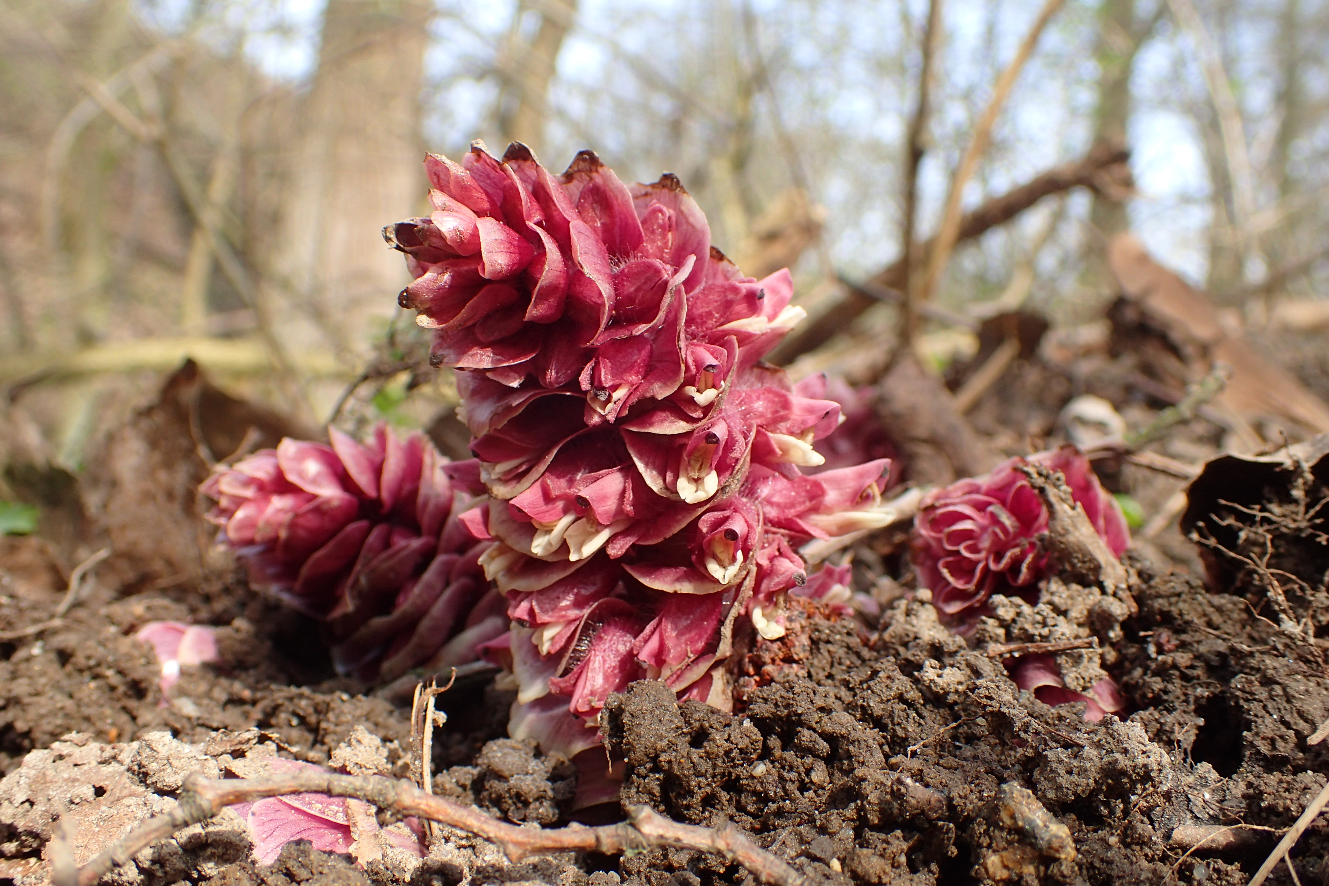 Lathraea squamaria. Przęsocin near Szczecin, NW Poland